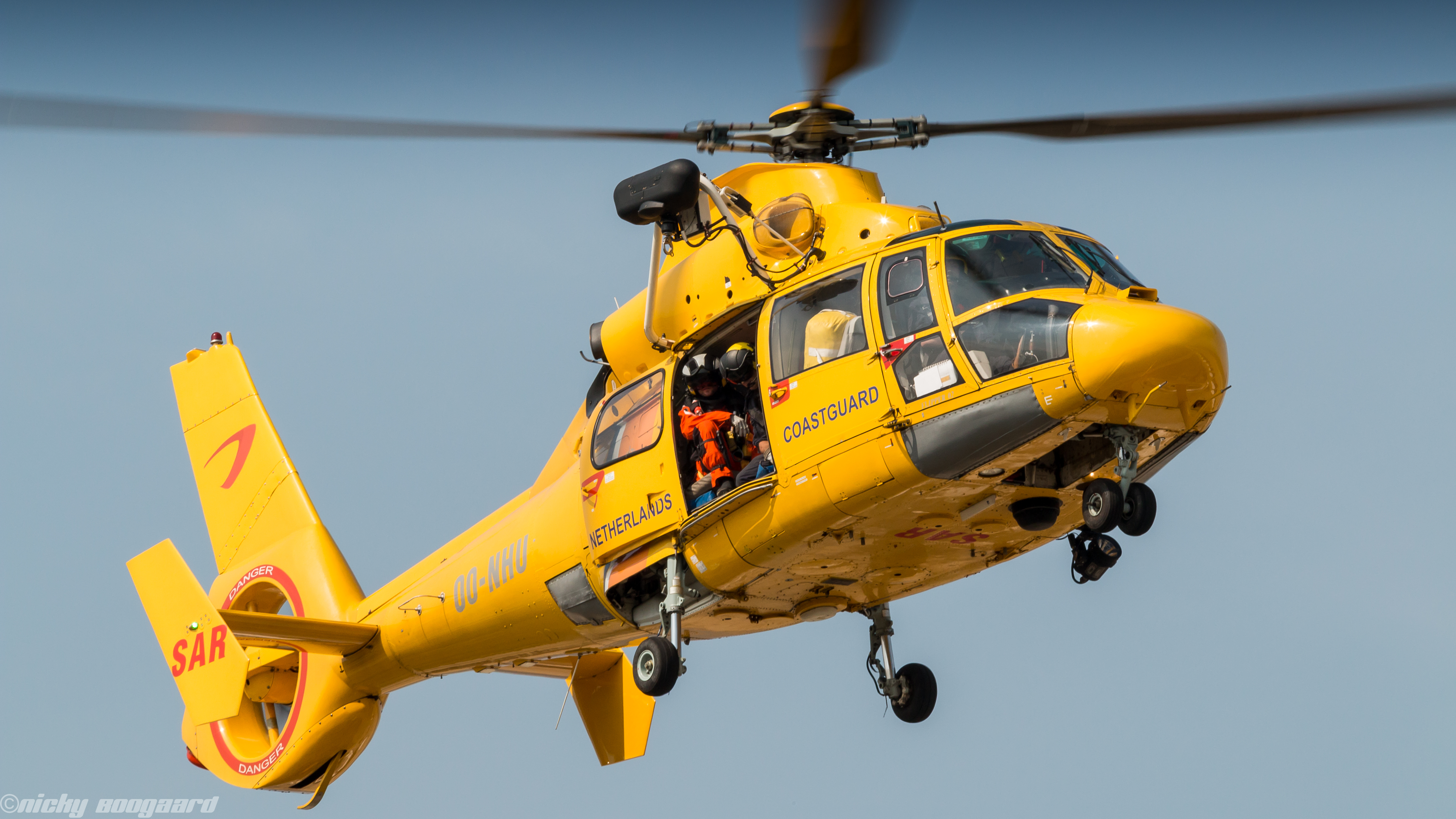 Katwijk aan zee, the Netherlands